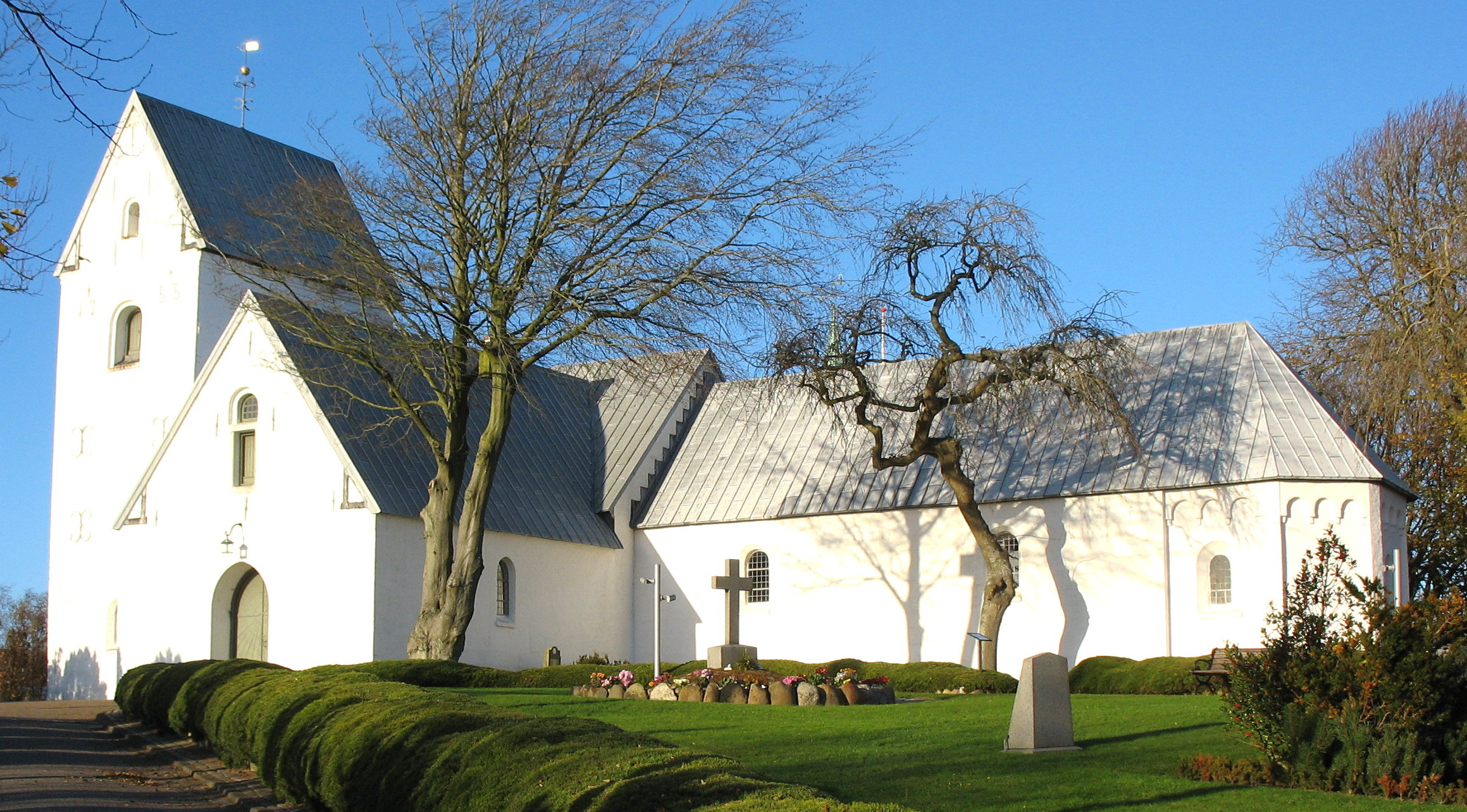 Vor Frue Kirke (Skive Kommune)